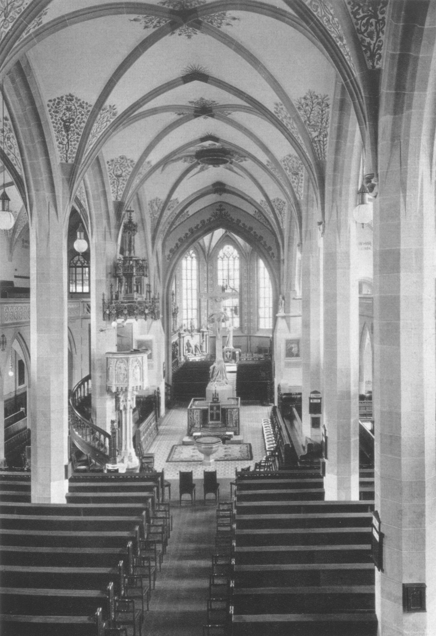 Blick in den Chor der Hospitalkirche in Stuttgart.